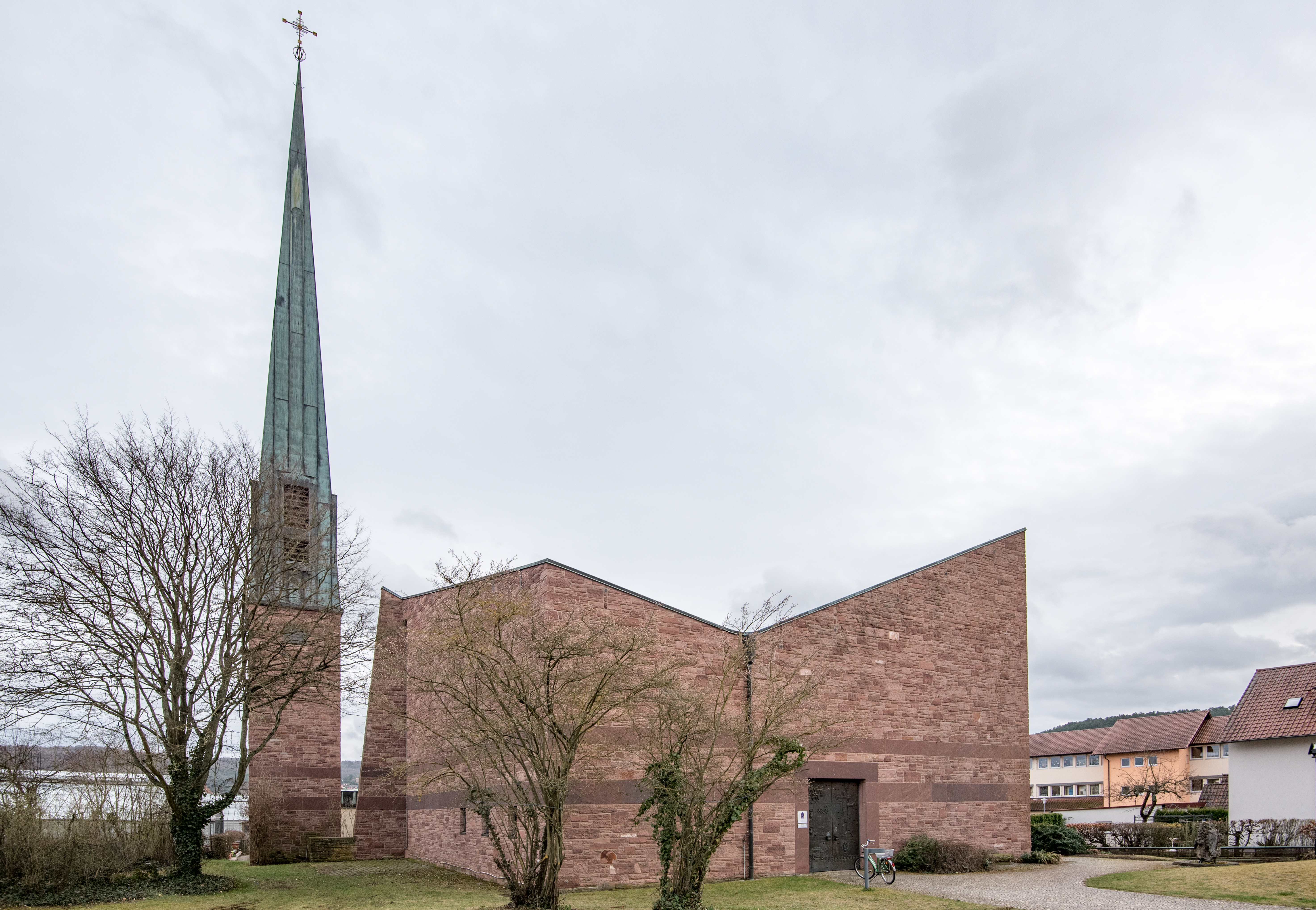 Hammelburg, Friedrich-Müller-Straße 13